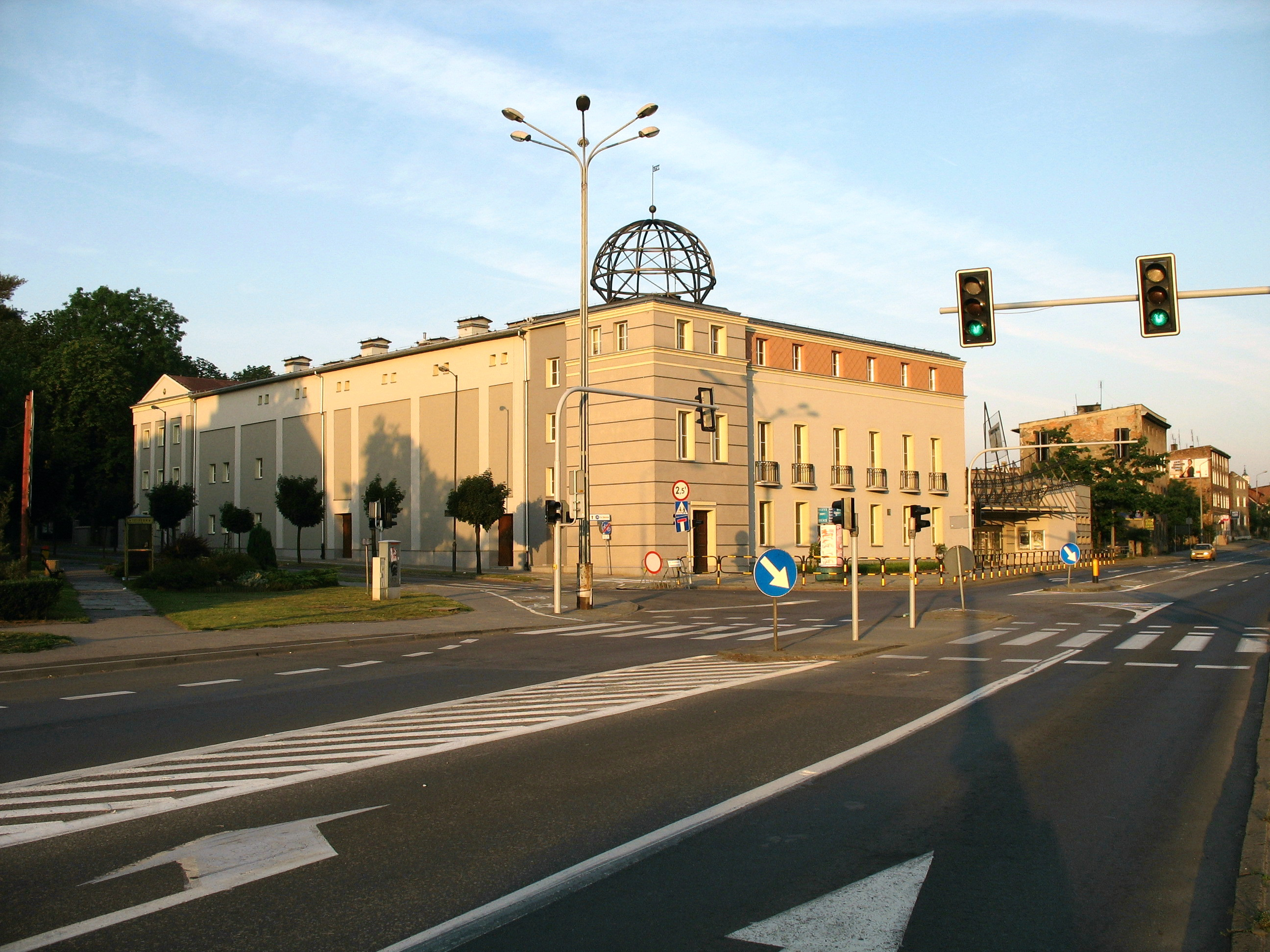 Budynek Gliwickiego Teatru Muzycznego